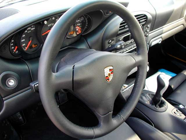 Porsche 911 GT3 996 (2003) steering wheel150